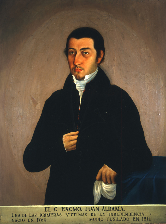 El C. Excmo. Juan Aldama